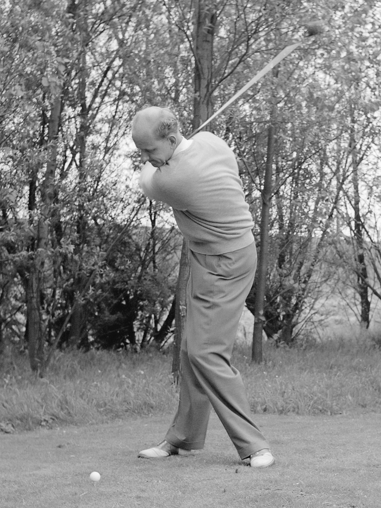 Internationaal golfkampioenschap, J.F. Dudok van Heel 25 juni 1955